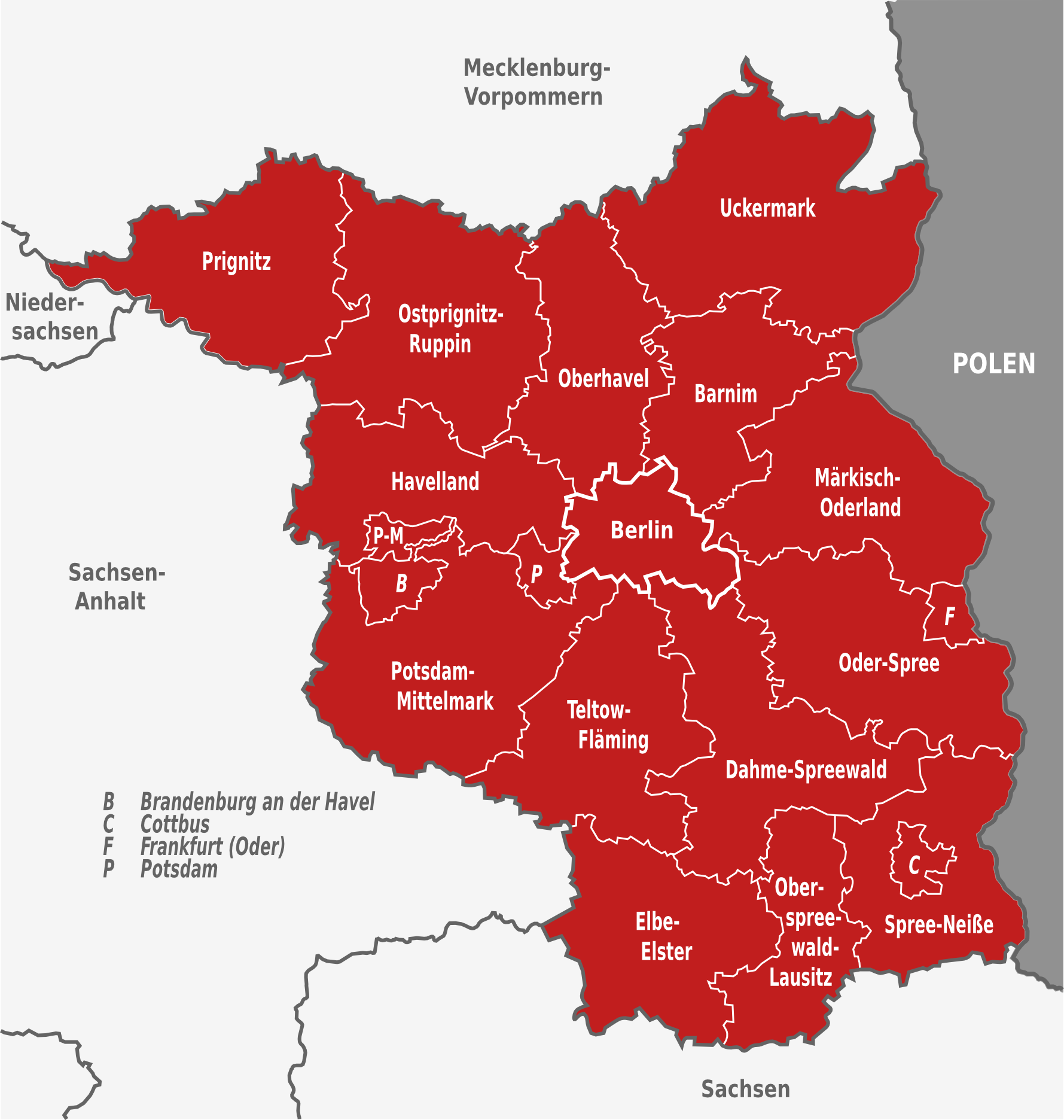 Karte der Metropolregion Berlin-Brandenburg